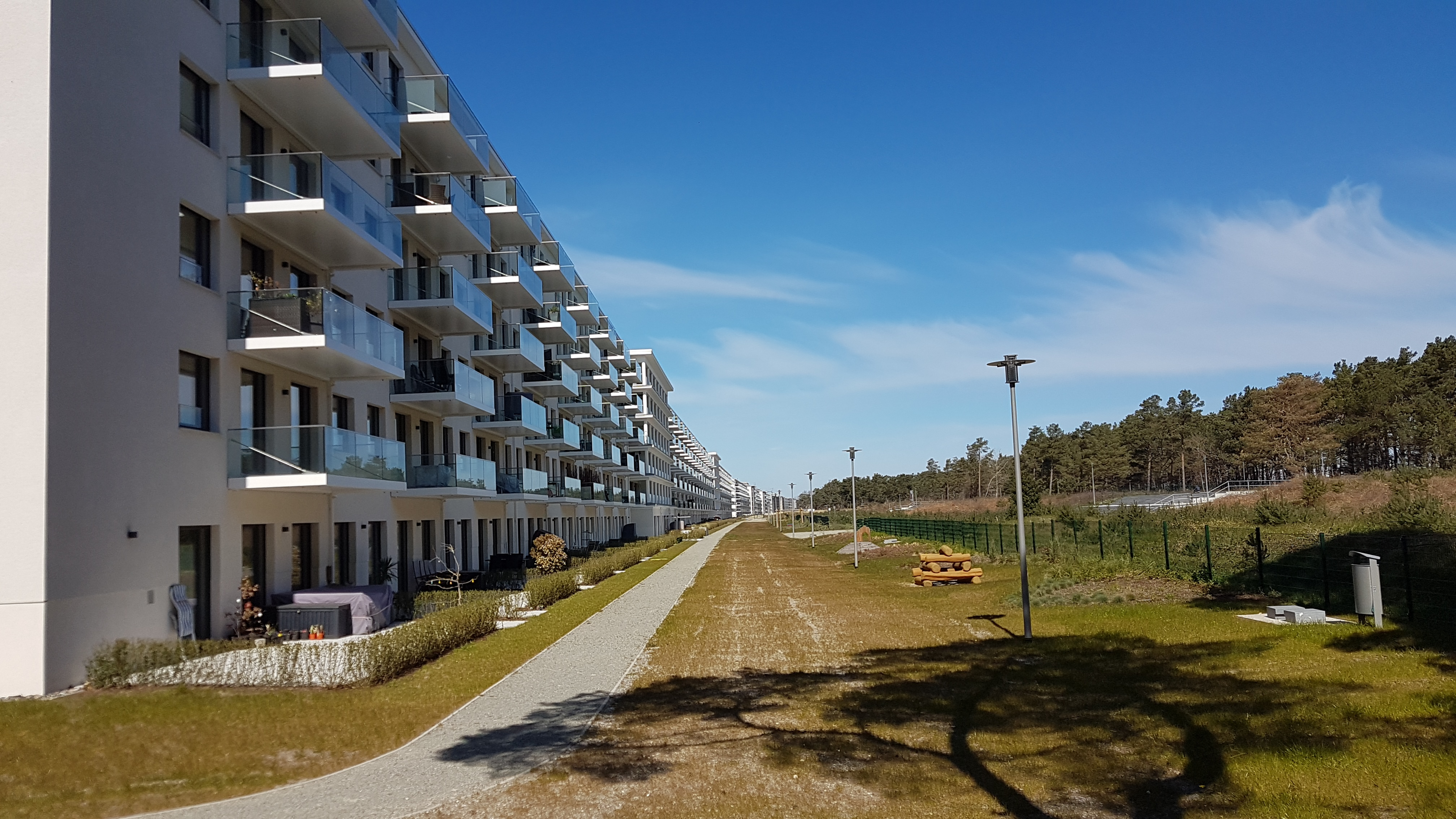 Blick vom südlichen Ende des rekonstruierten Blocks I (Südflügel 3) des Gebäudekomplexes Prora an der Seeseite entlang Richtung Norden